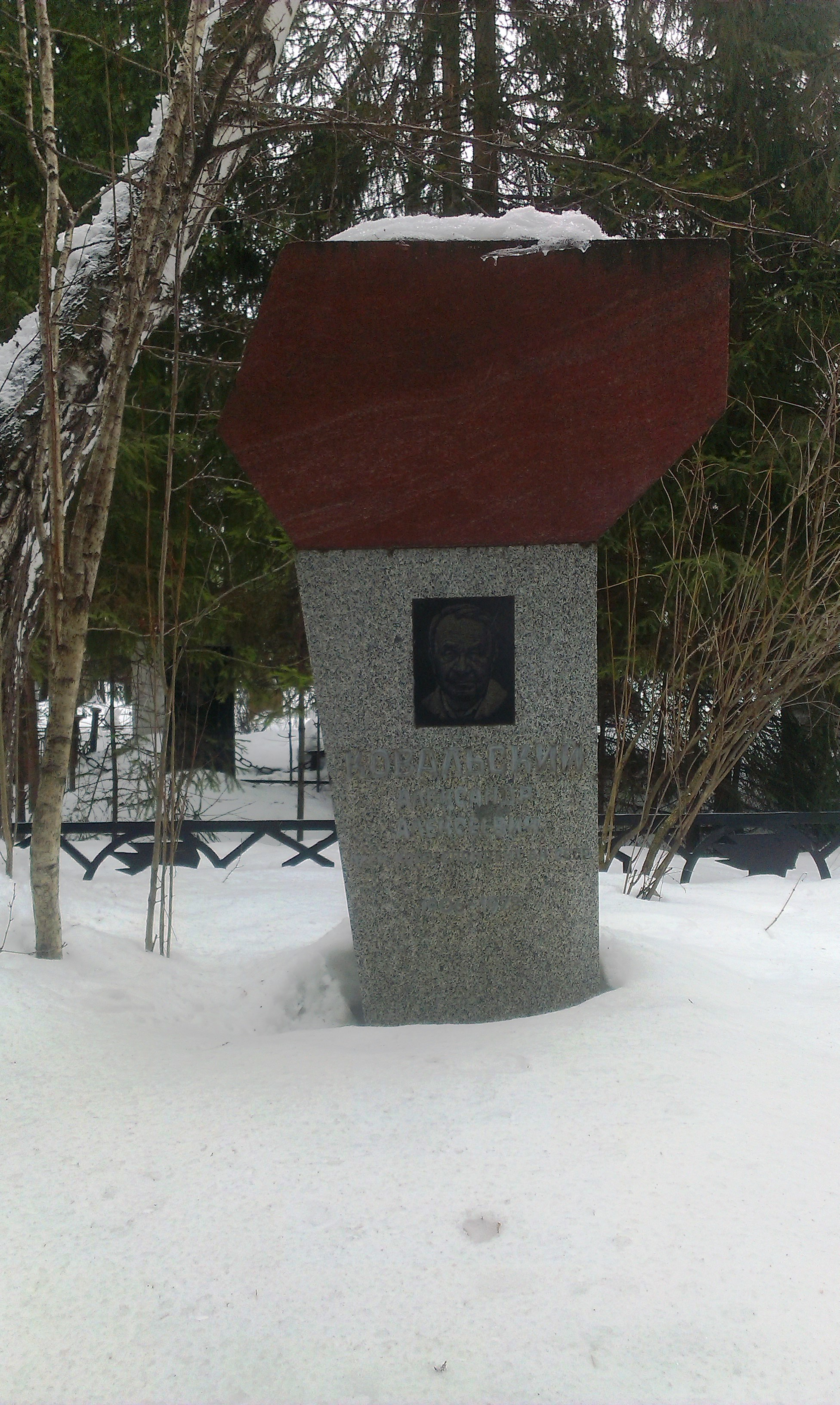 Южное кладбище в Новосибирске